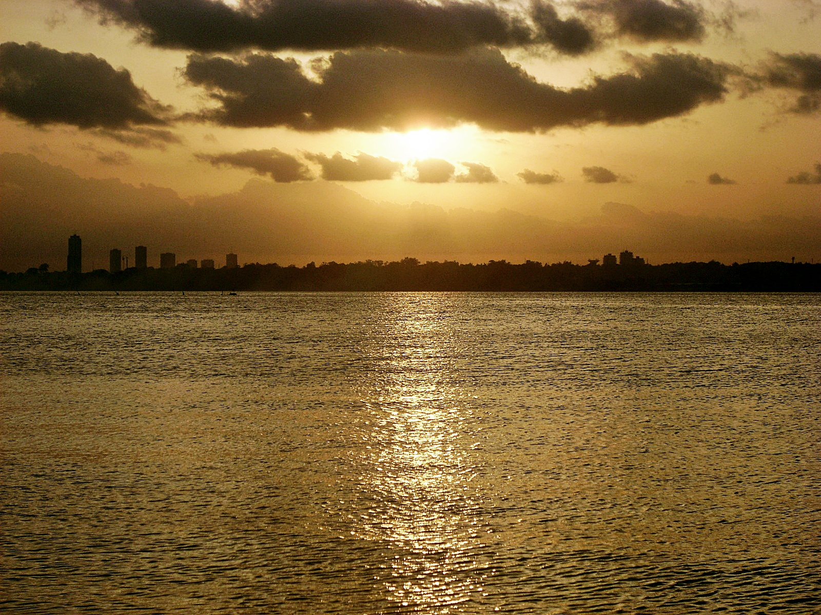 Coucher de soleil sur la lagune Ébrié, à Abidjan. Les tours visibles à l'horizon sont celles de la Cité administrative.